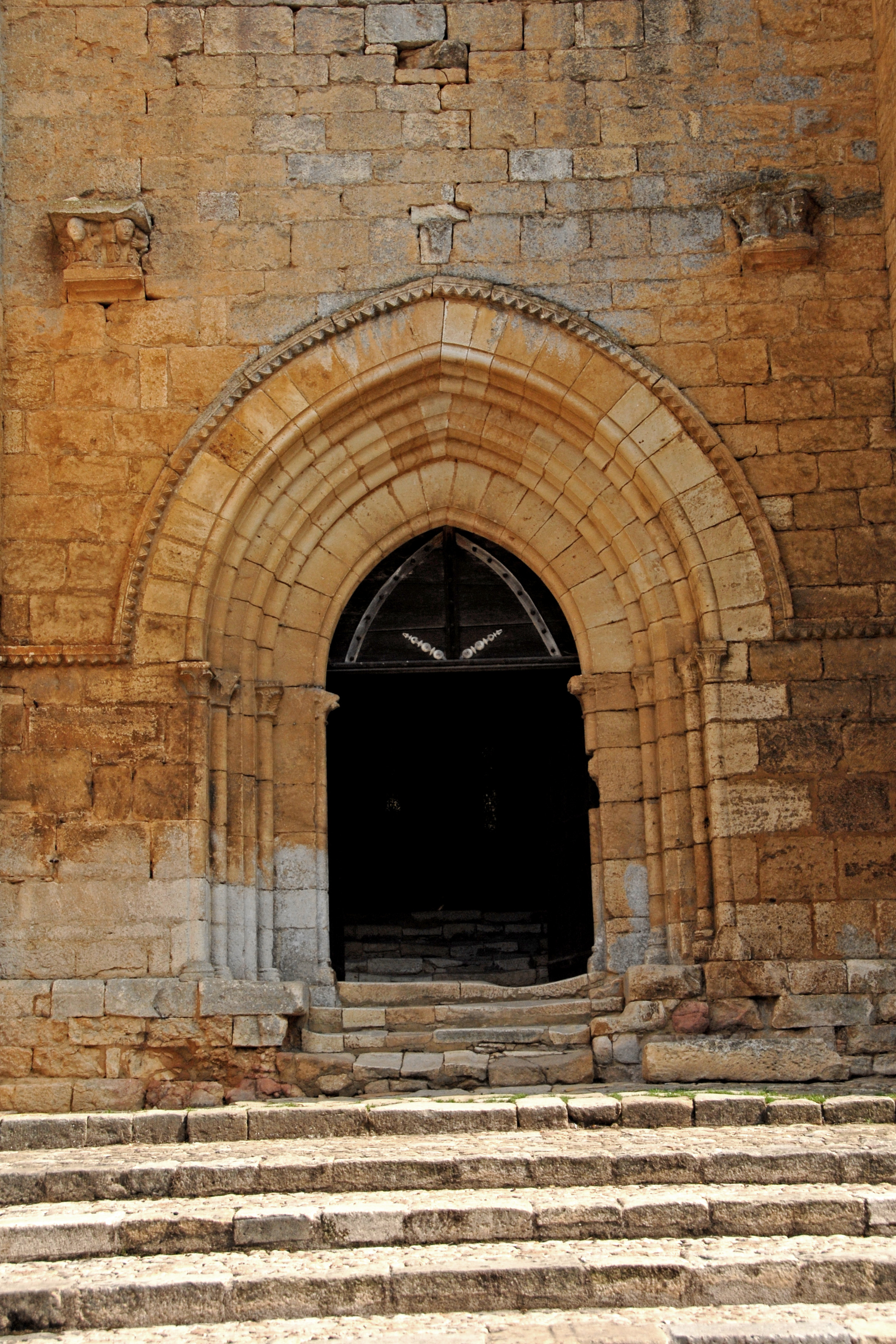 Saint-Amand-de-Coly, Portal